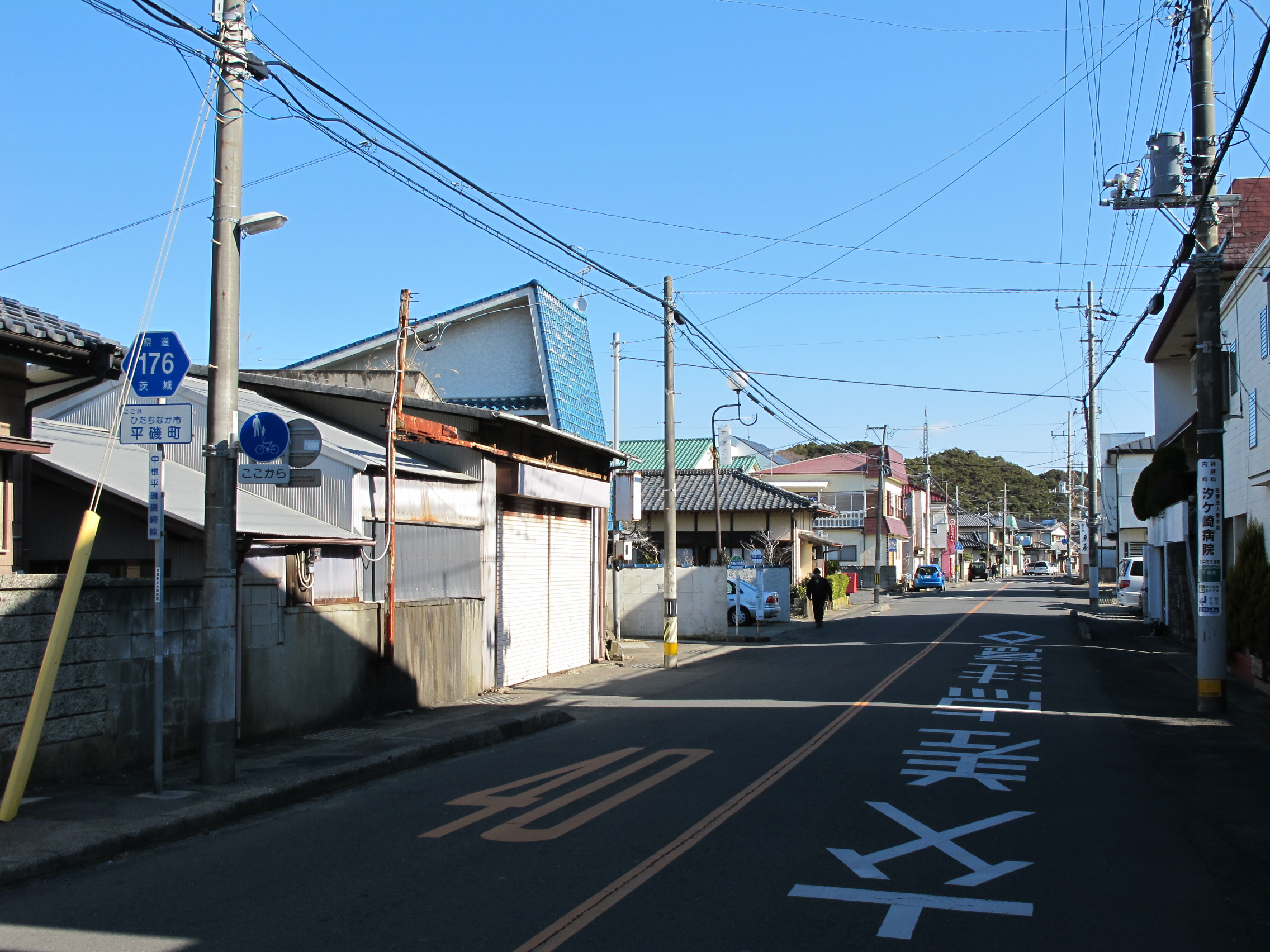 茨城県道175号中根平磯磯崎線（ひたちなか市平磯町）